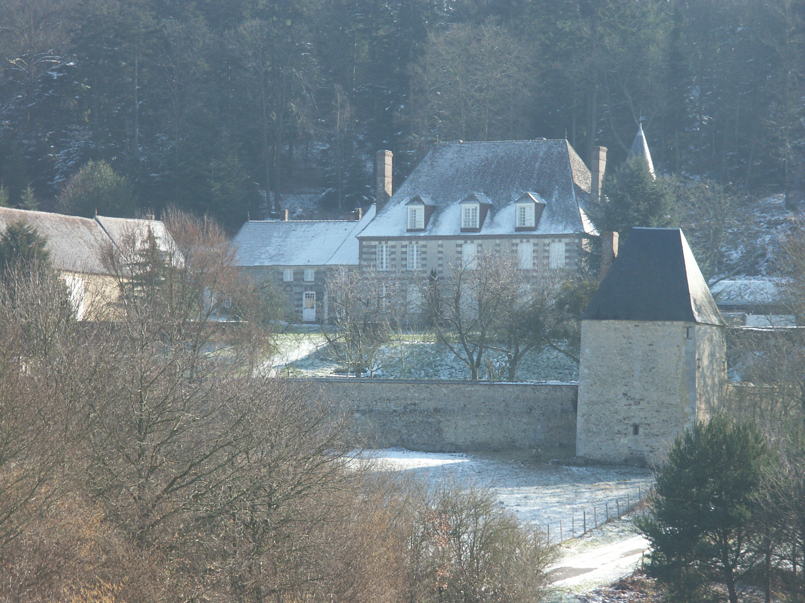 Fin 16e s. ISMH1978 .